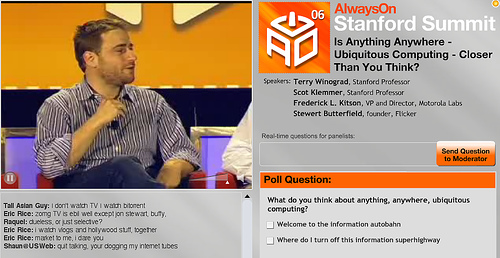 Vidéo conférence, pédagogie